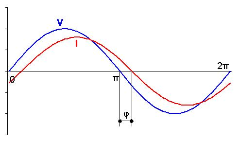 O gráfico mostra a onda de corrente atrasada em relação à onda de tensão - nesse caso o fator de potência é menor do que 1 e a carga possui componente indutivo.